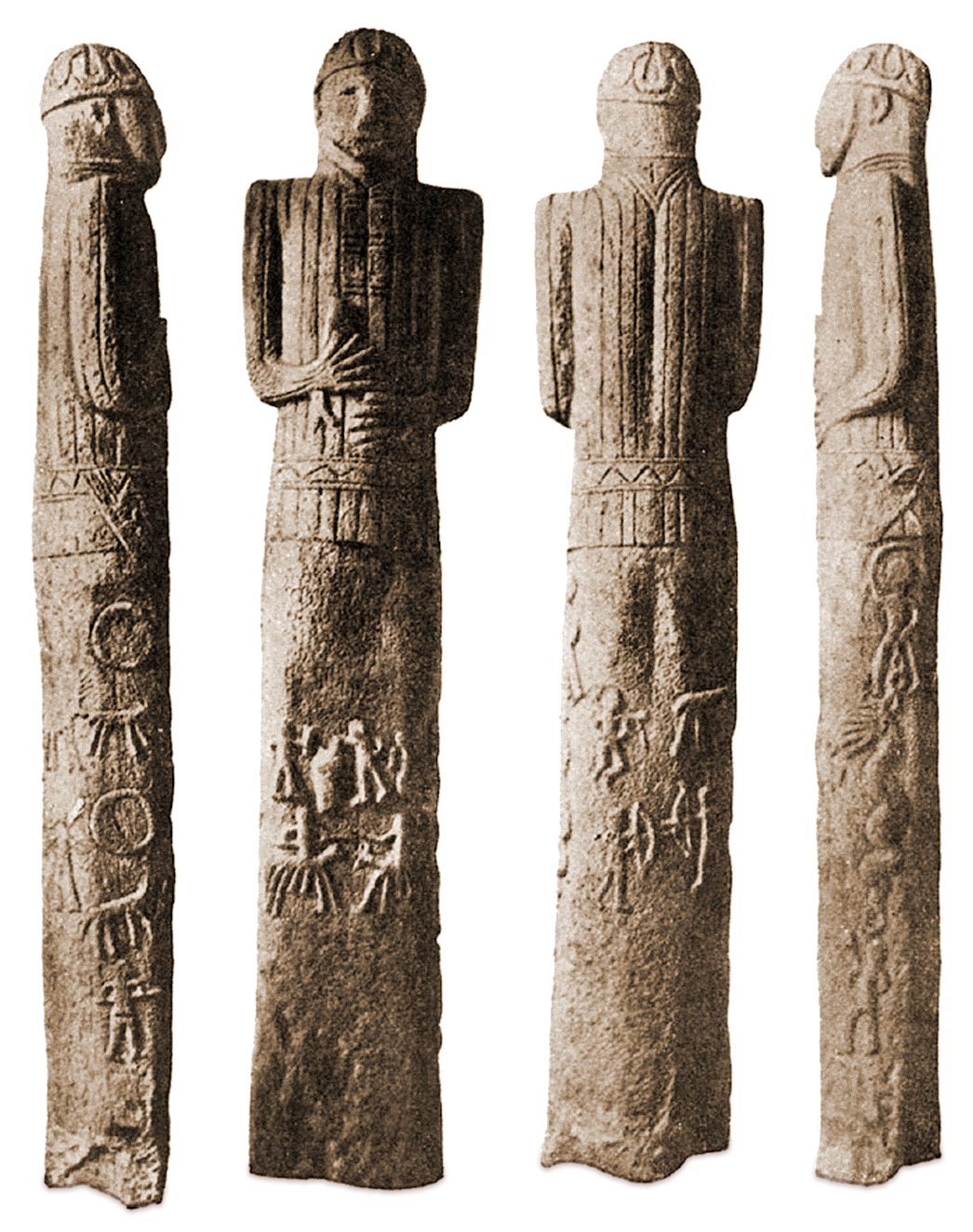 Этокский памятник. IV век. Миллер Вс. Древнеосетинский памятник из Кубанской области // Материалы по археологии Кавказа. Вып. III — 1893. (Публикуется по Иессен А. А. Археологические памятники Кабардино-Балкарии // Материалы и исследования по археологии СССР № 3. Материалы по археологии Кабардино-Балкарии / Под. ред. М. И. Артамонова — М., Л.: Издательство Академии наук СССР, 1941.)